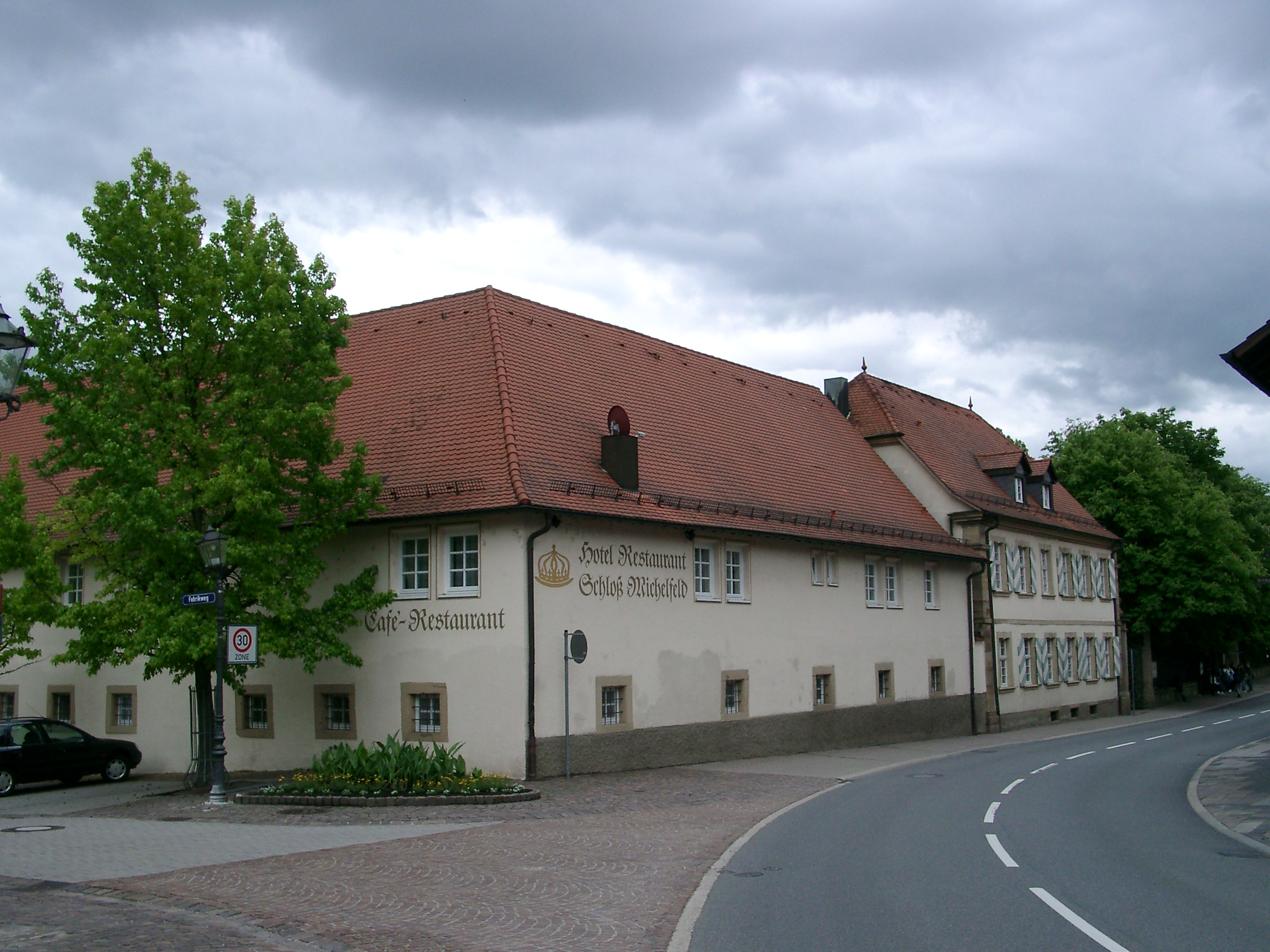 Angelbachtal, Ortsteil Michelfeld, Schloß